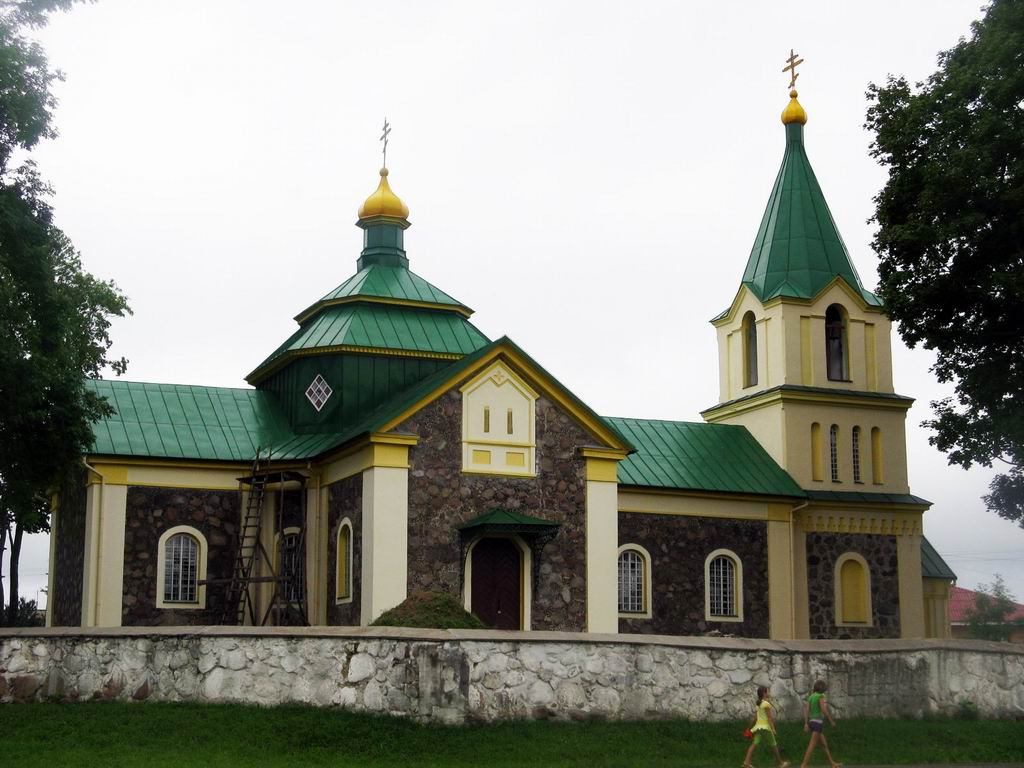 Беларуская (тарашкевіца): Астрына